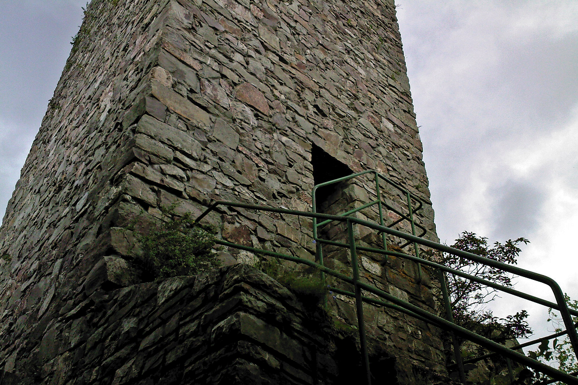 Aussichtsturm, Burg Koppenstein, Gemünden, Hunsrück